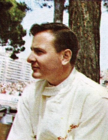 Bruce McLaren en 1966 - Campioni dello Sport 1966-1967, n°82